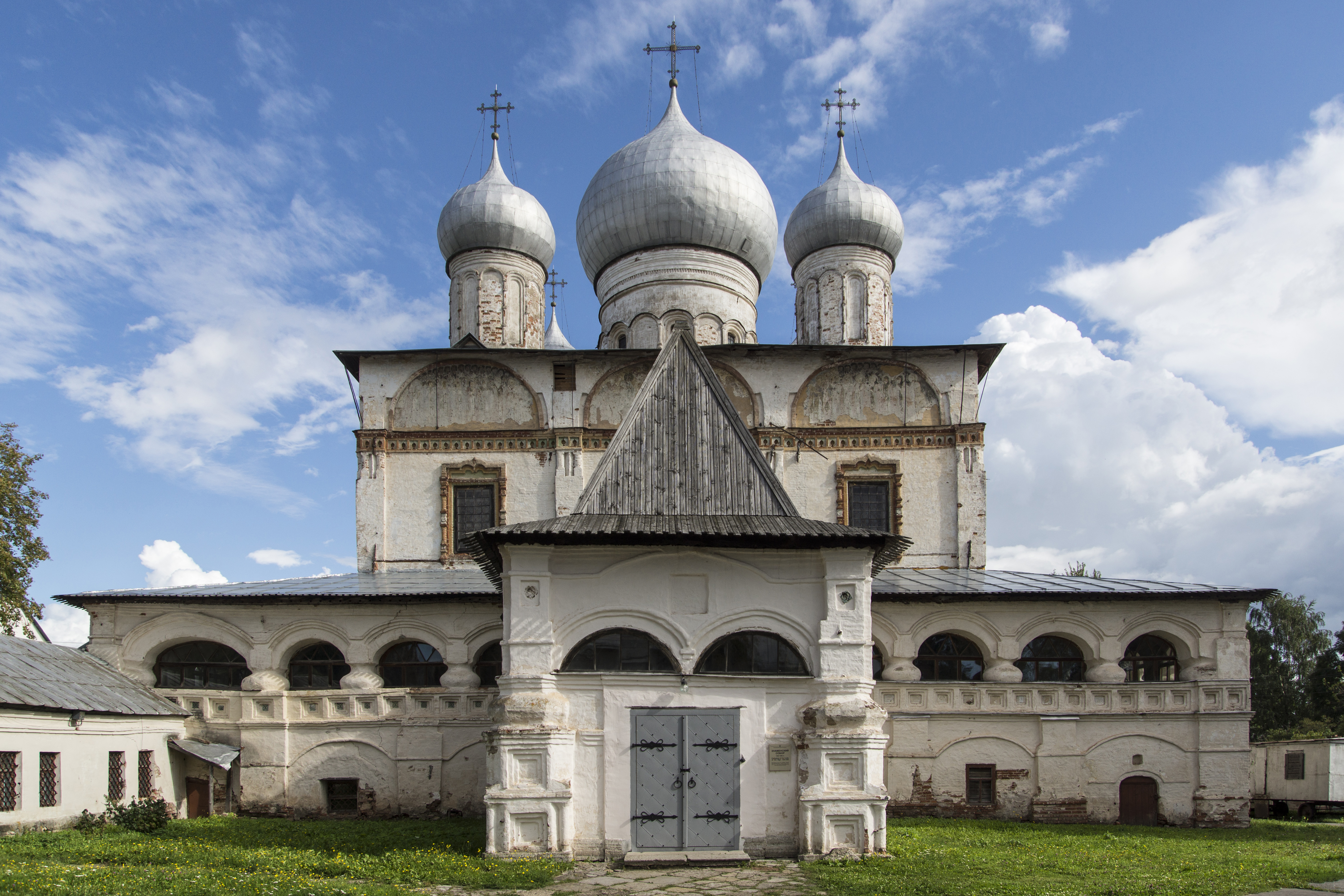 Знаменский собор в Великом Новгороде